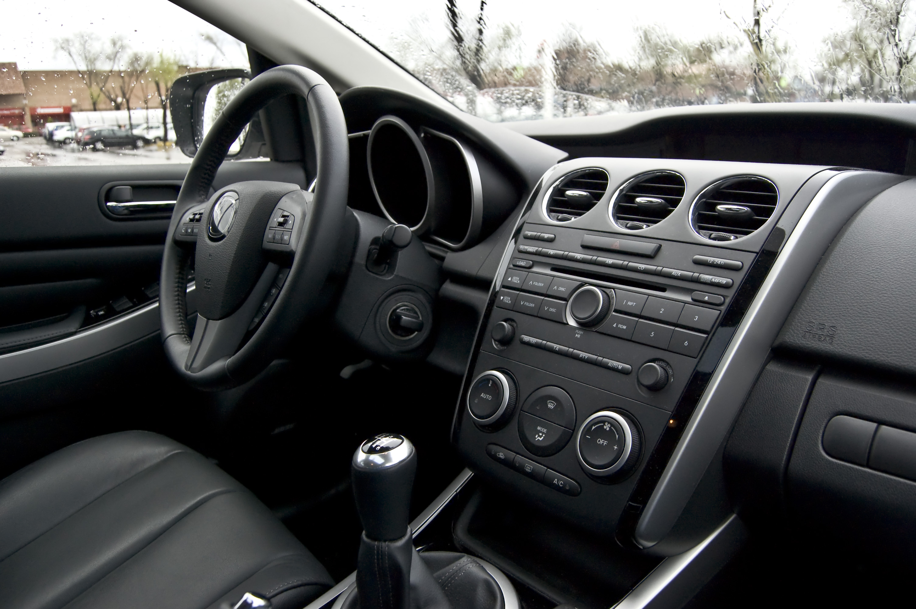 Prueba del Mazda CX-7 para Diariomotor